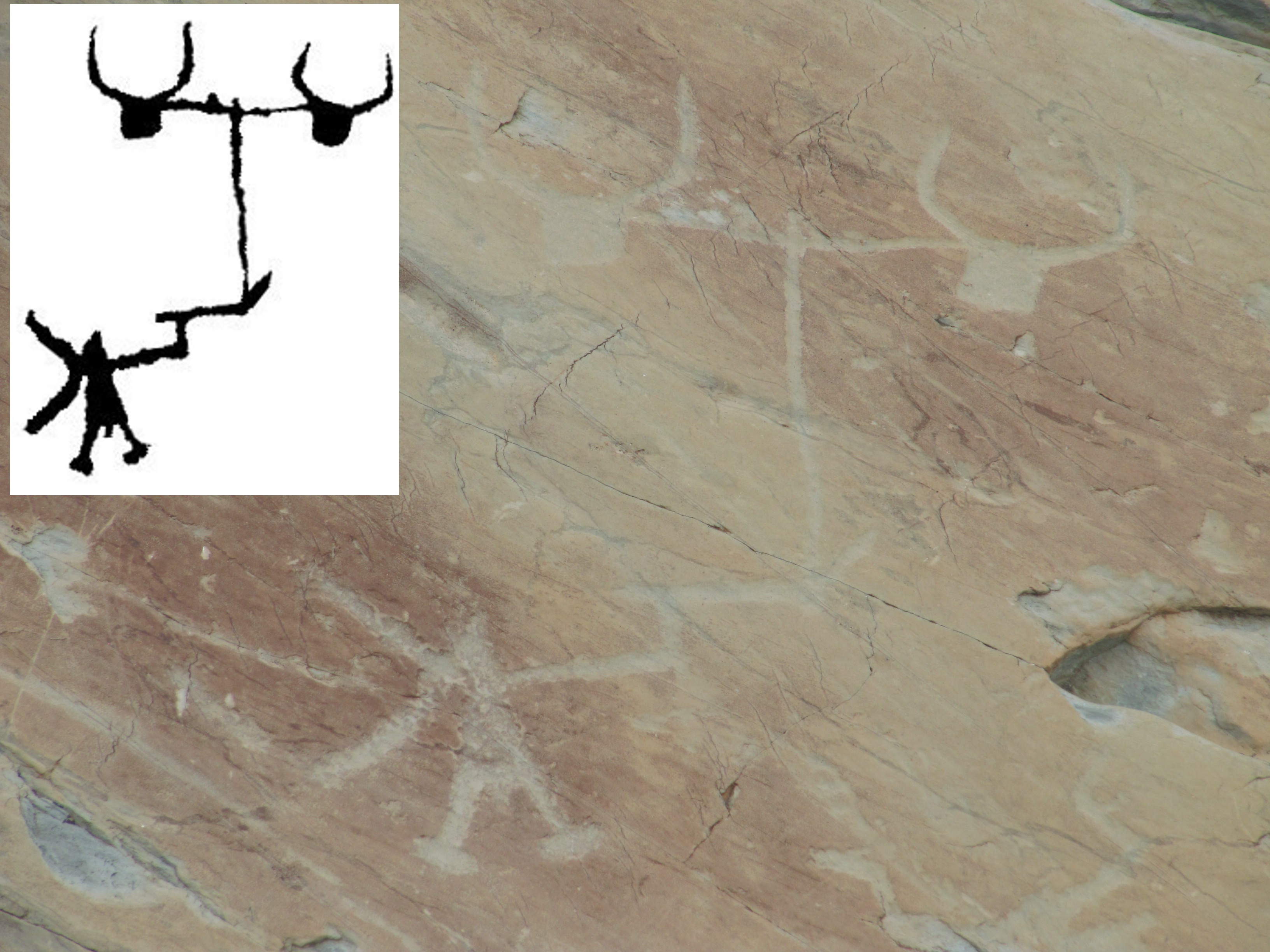 Une araire sur la voie sacrée de la vallée de la Fontanalbe